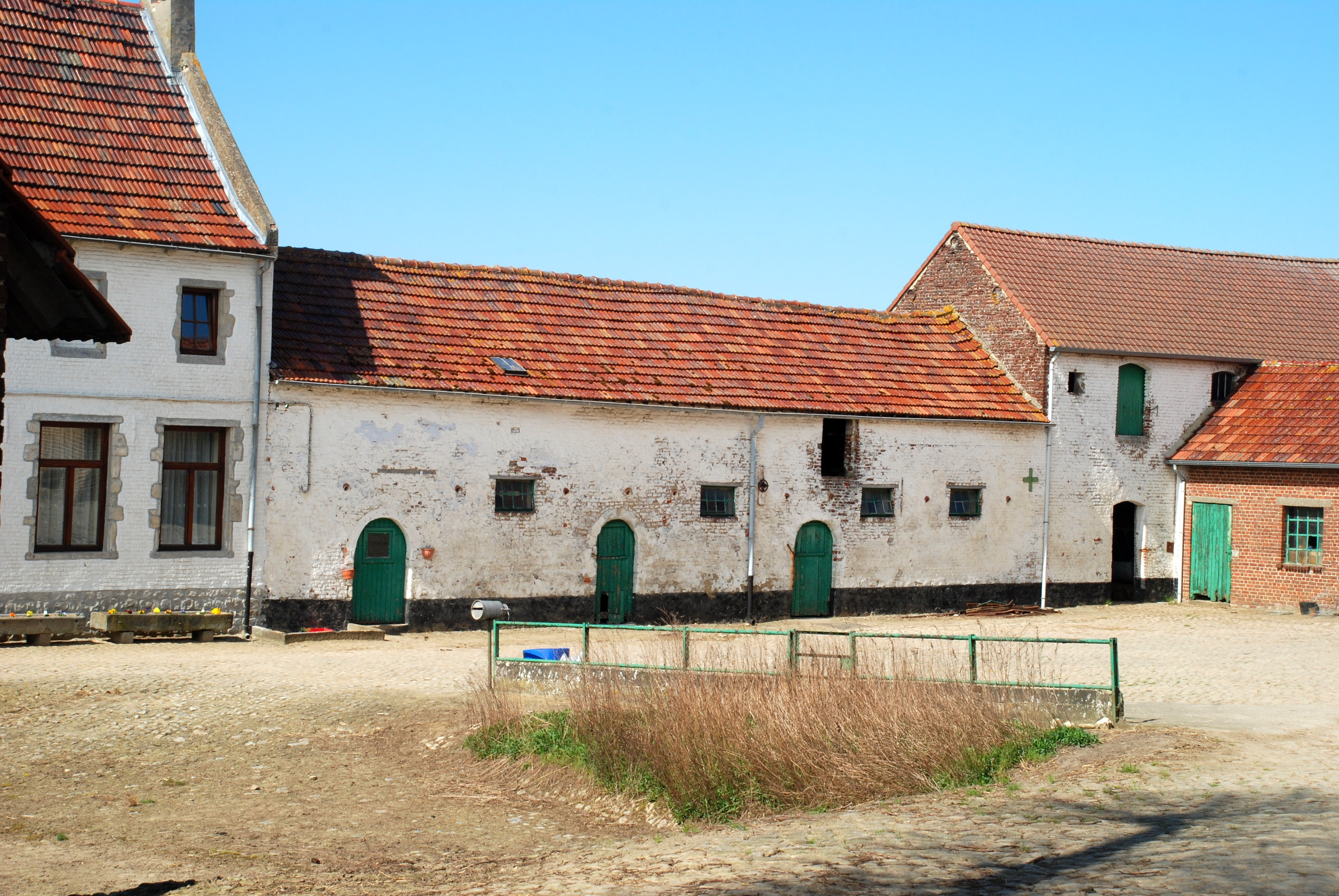 Belgique - Brabant wallon - Genappe - Ferme du Chantelet